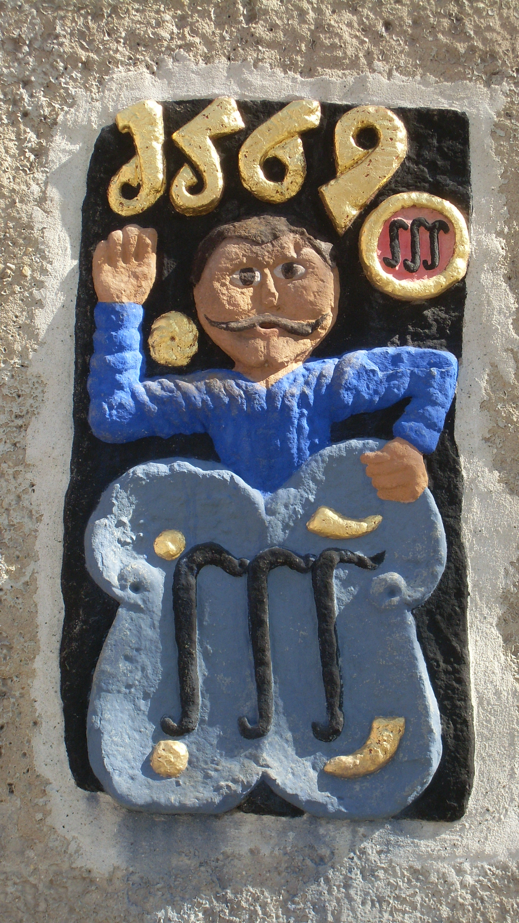 Das Soltemänneken an der Rückseite der Georgskirche.